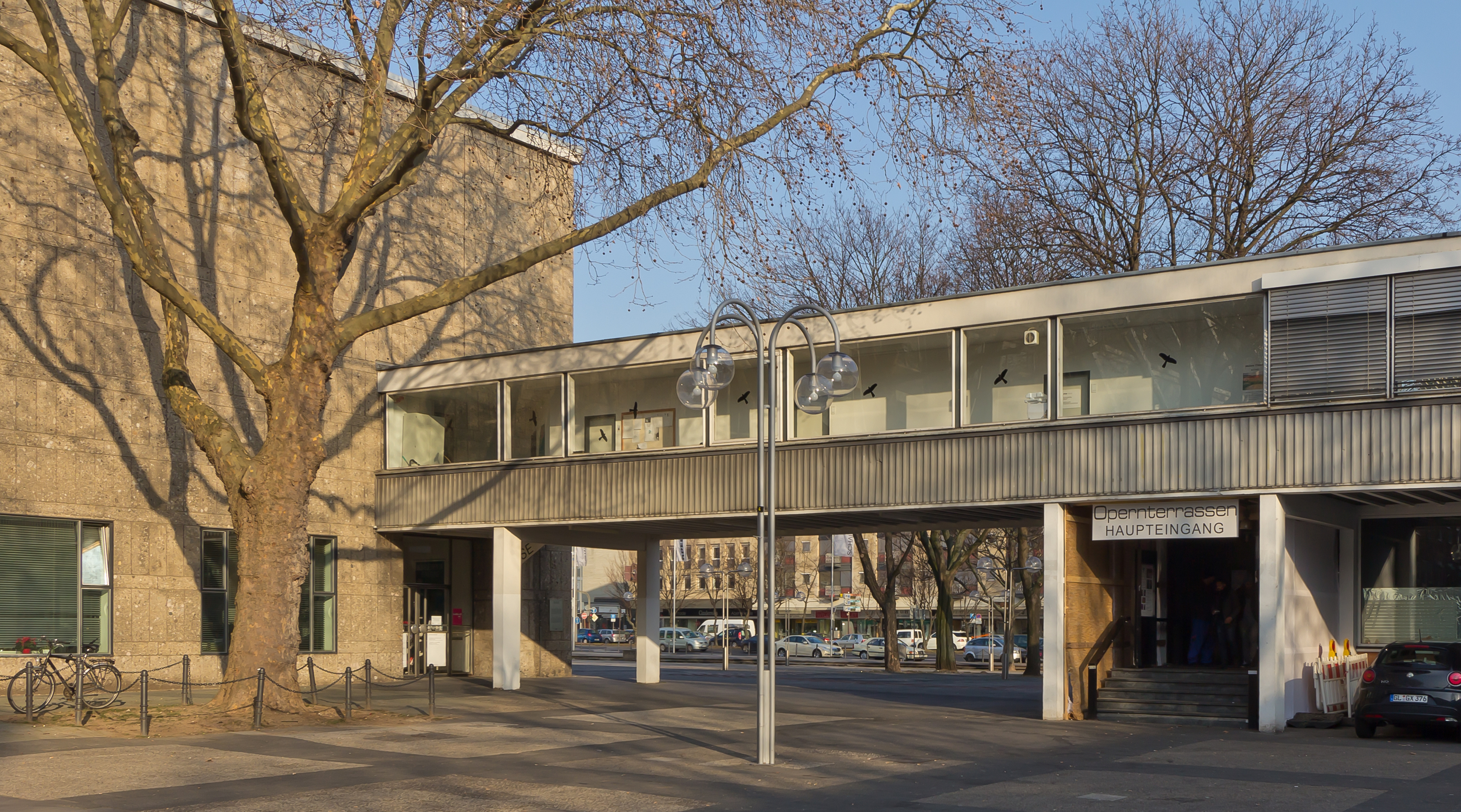 Denkmalgeschützte Theaterrestaurant „Opernterrassen“ mit Verbindungsbrücke zur Oper Köln (links). Ansicht vom „Kleinen Offenbachplatz“ Die Verbindungsbrücke wurde im September/Oktober 2012 im Rahmen der Sanierungsmaßnahmen von Oper und Schauspielhaus abgerissen